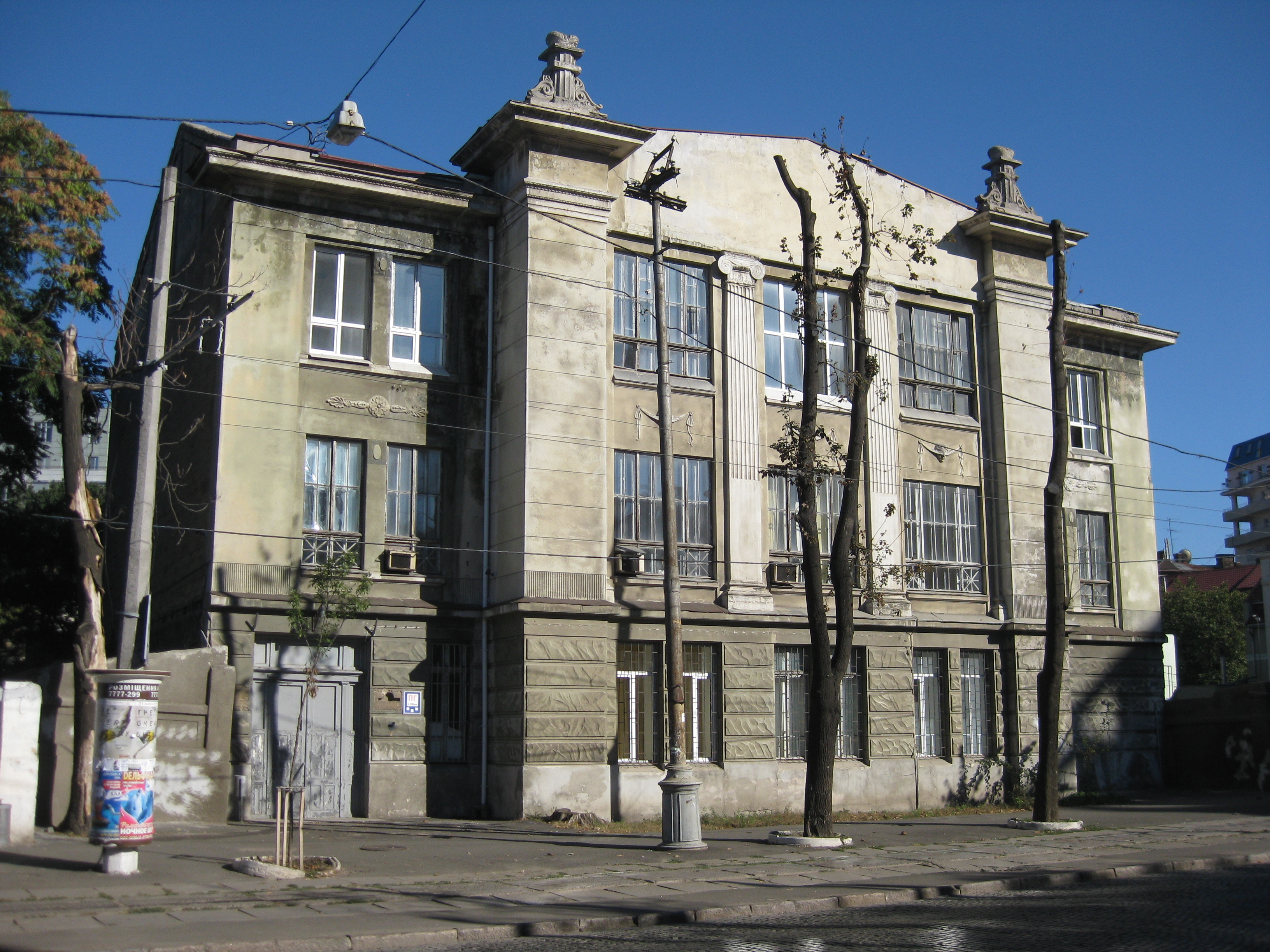 Будинок з’їзду мирових суддів, Одеса, Французький бул., 1